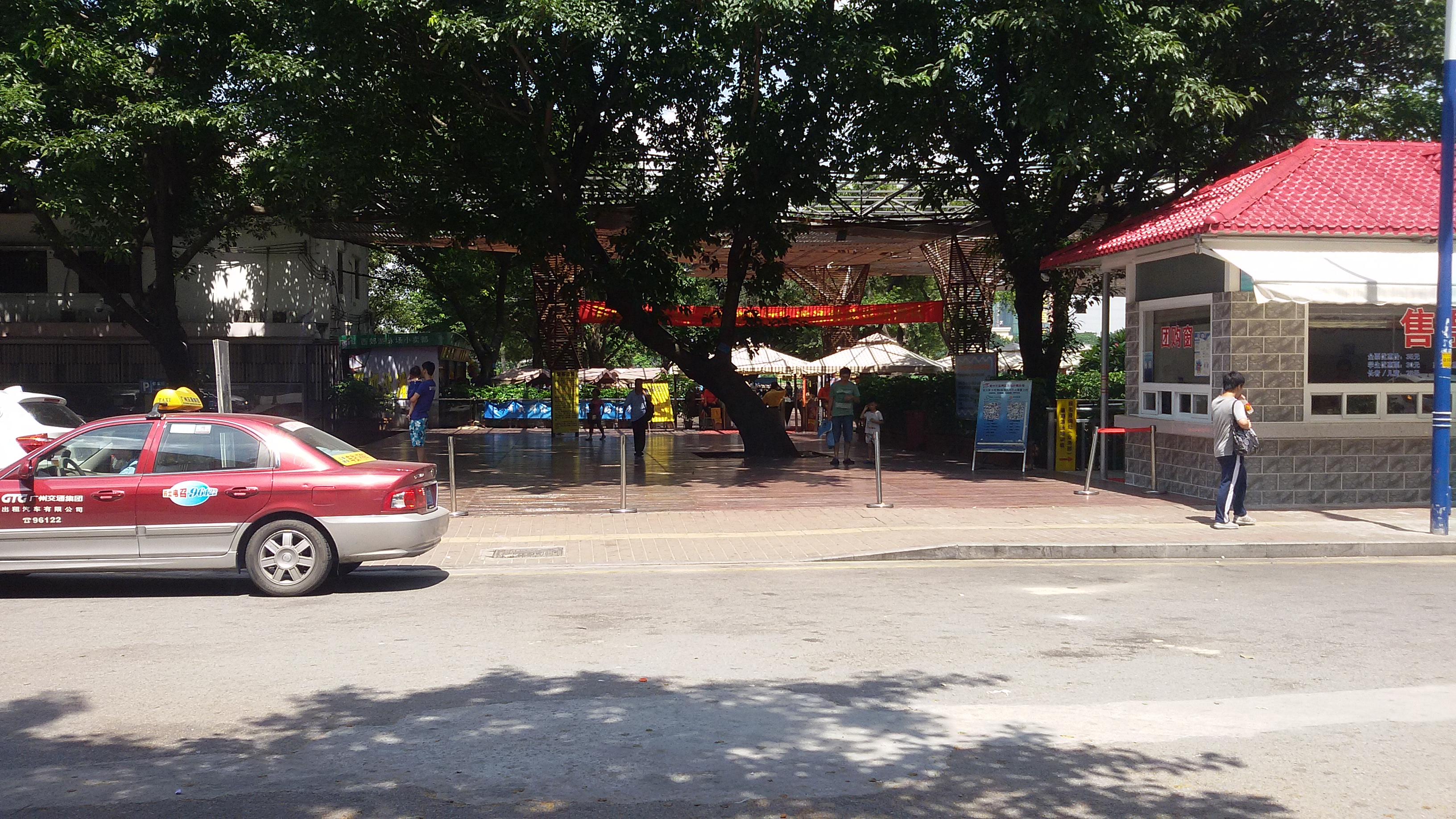 粵語: 西郊泳場嘅正門